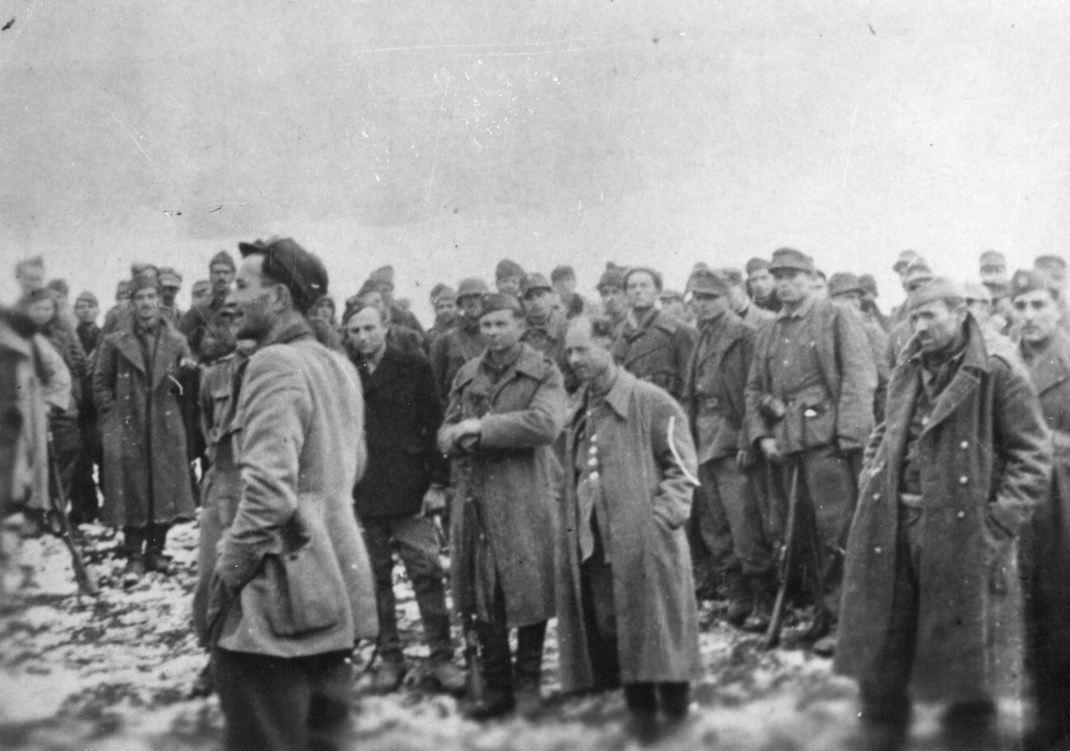 Srpskohrvatski / српскохрватски: Svetozar Vukmanović Tempo, delegat CK KPJ, govori makedonskim partizanima, na Osogovu 1943.